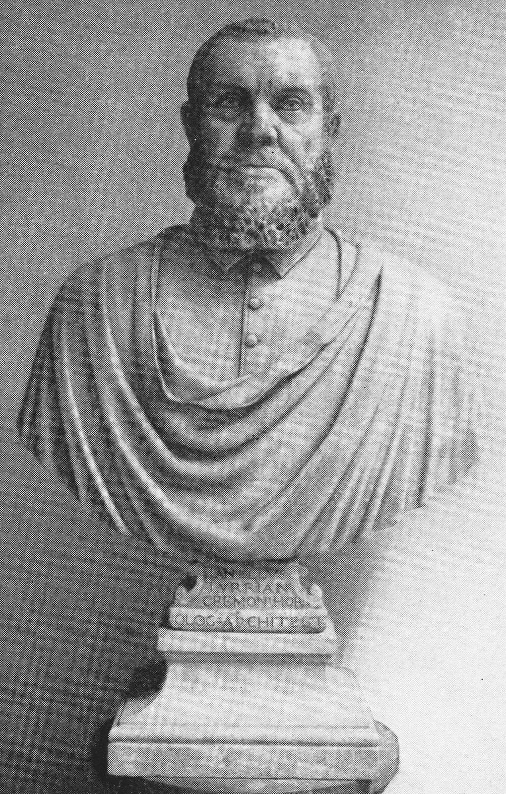 Juanelo Turriano (?–1585); Bildnisbüste vom Alonso Berruguete (1489–1561)